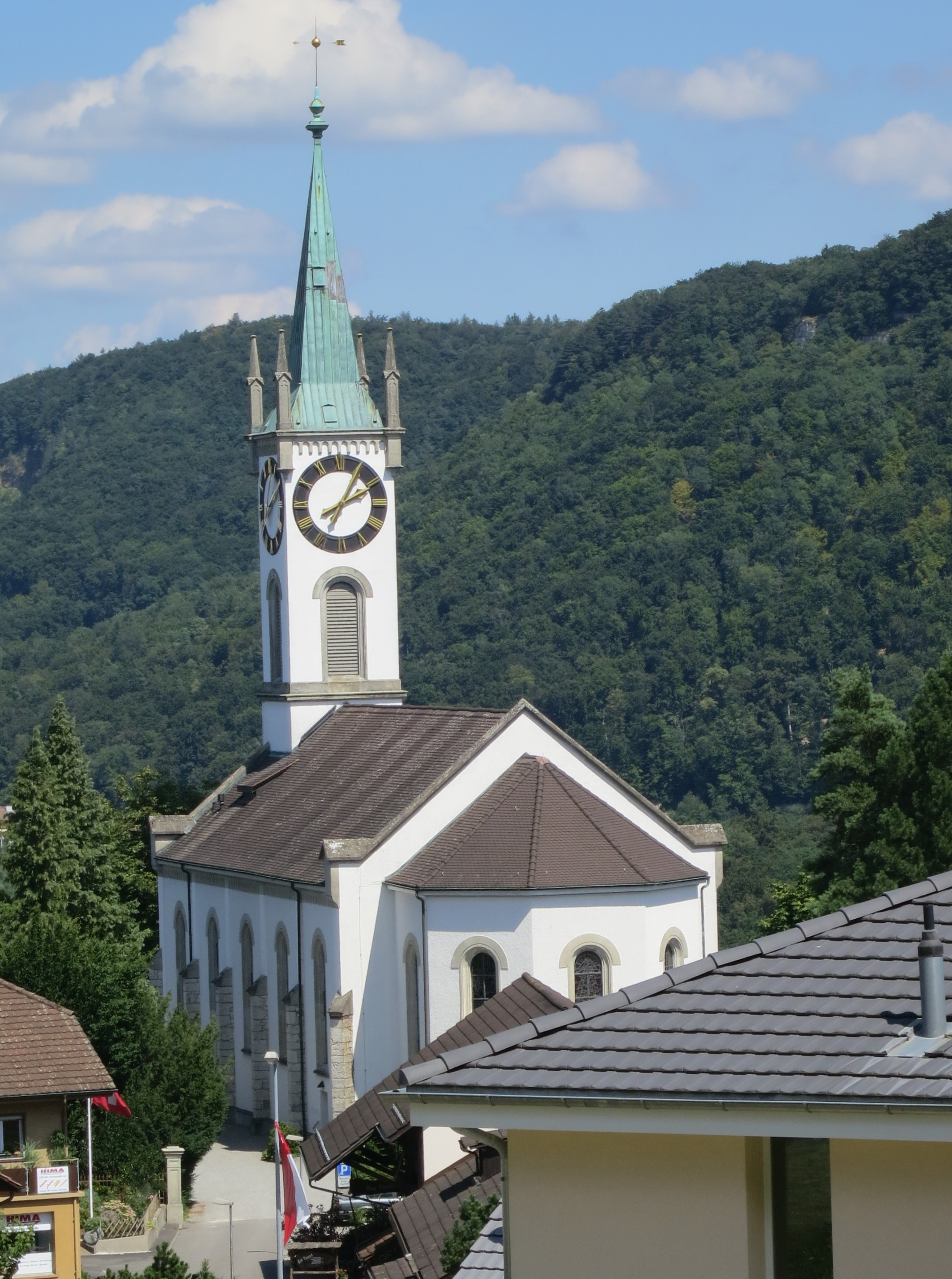 Kirche Vorderrein AG, Schweiz